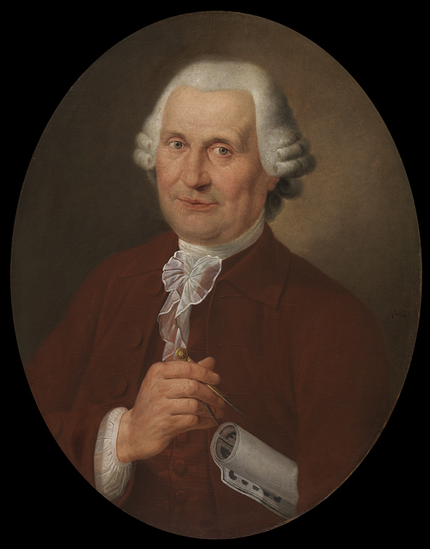 Portret van Emmanuel van Speybrouck-Coutteau (Joseph Benoît Suvée, circa 1771); collection: Musea Brugge - Groeningemuseum